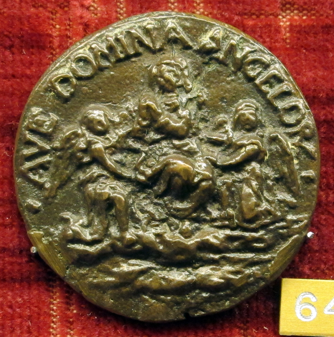 medaglia di autore anonimo